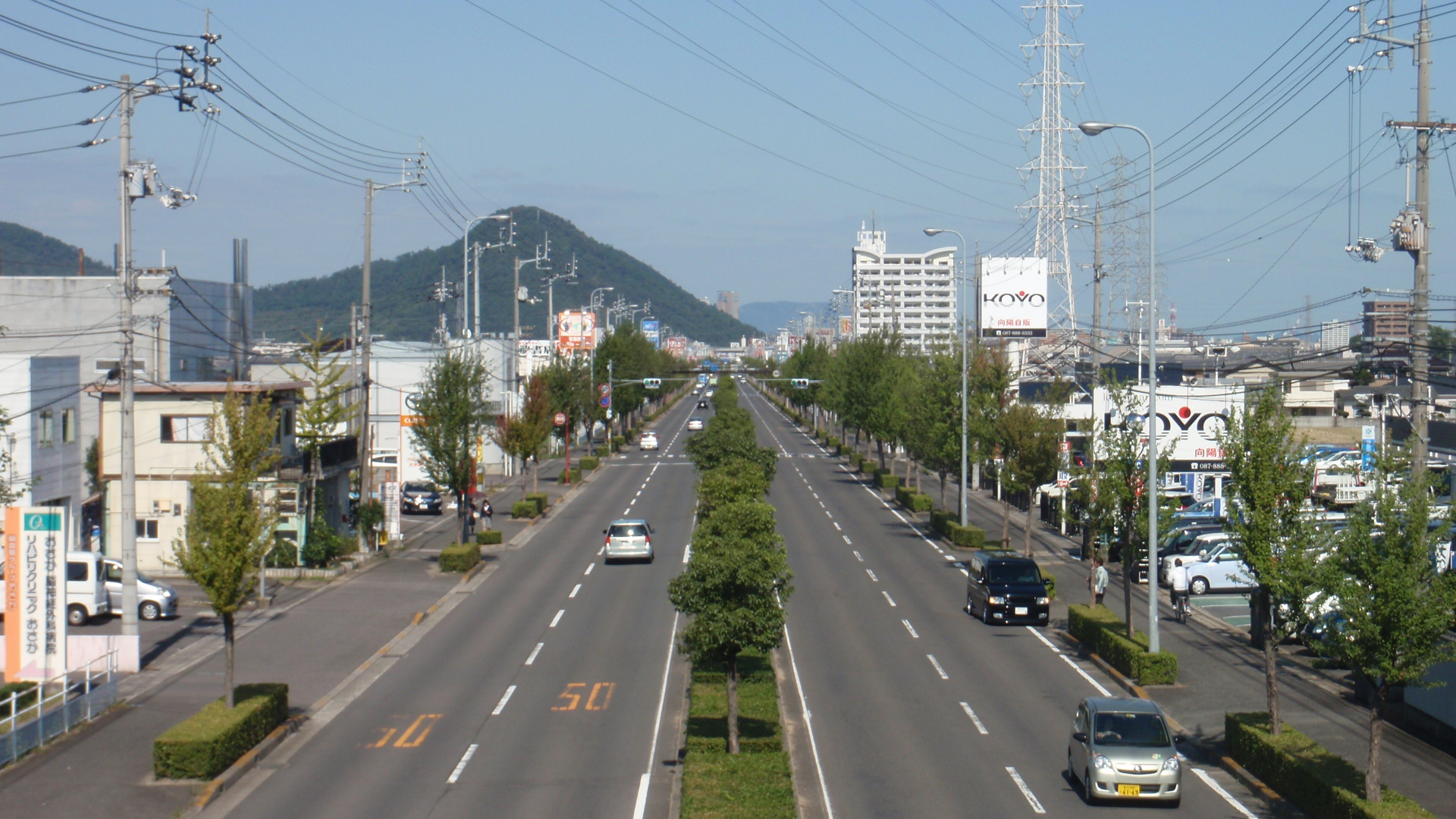 国道193号・空港通りの高松市三名町から北方向（上天神町方面）を見る。左奥の山は室山、その後ろは高松シンボルタワーの一部。